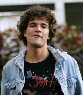 17/07/2003 - ator brasileiro Daniel de Oliveira. Cenas do filme Cazuza - Gravado no Colégio Sagrado Coração, no Alto da Boa Vista. Foto de Andréa Farias